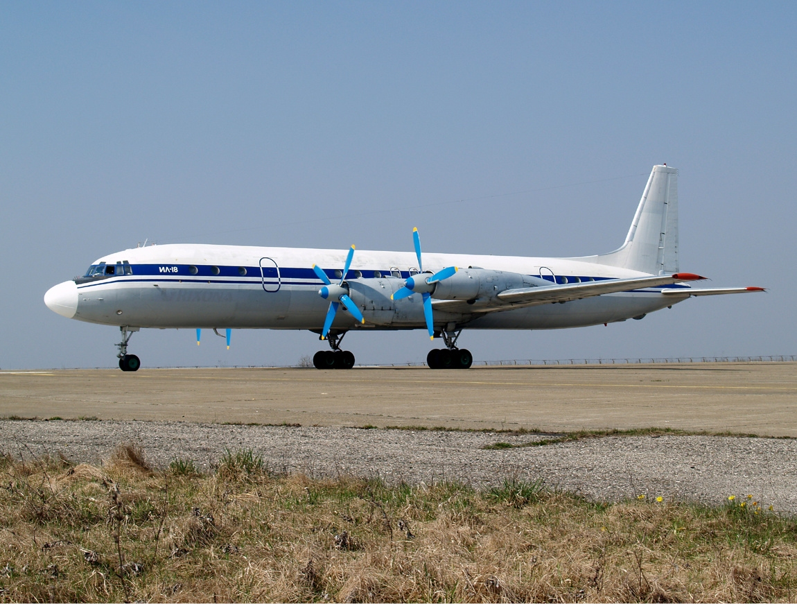 Grixona Ilyushin Il-18D at Balti